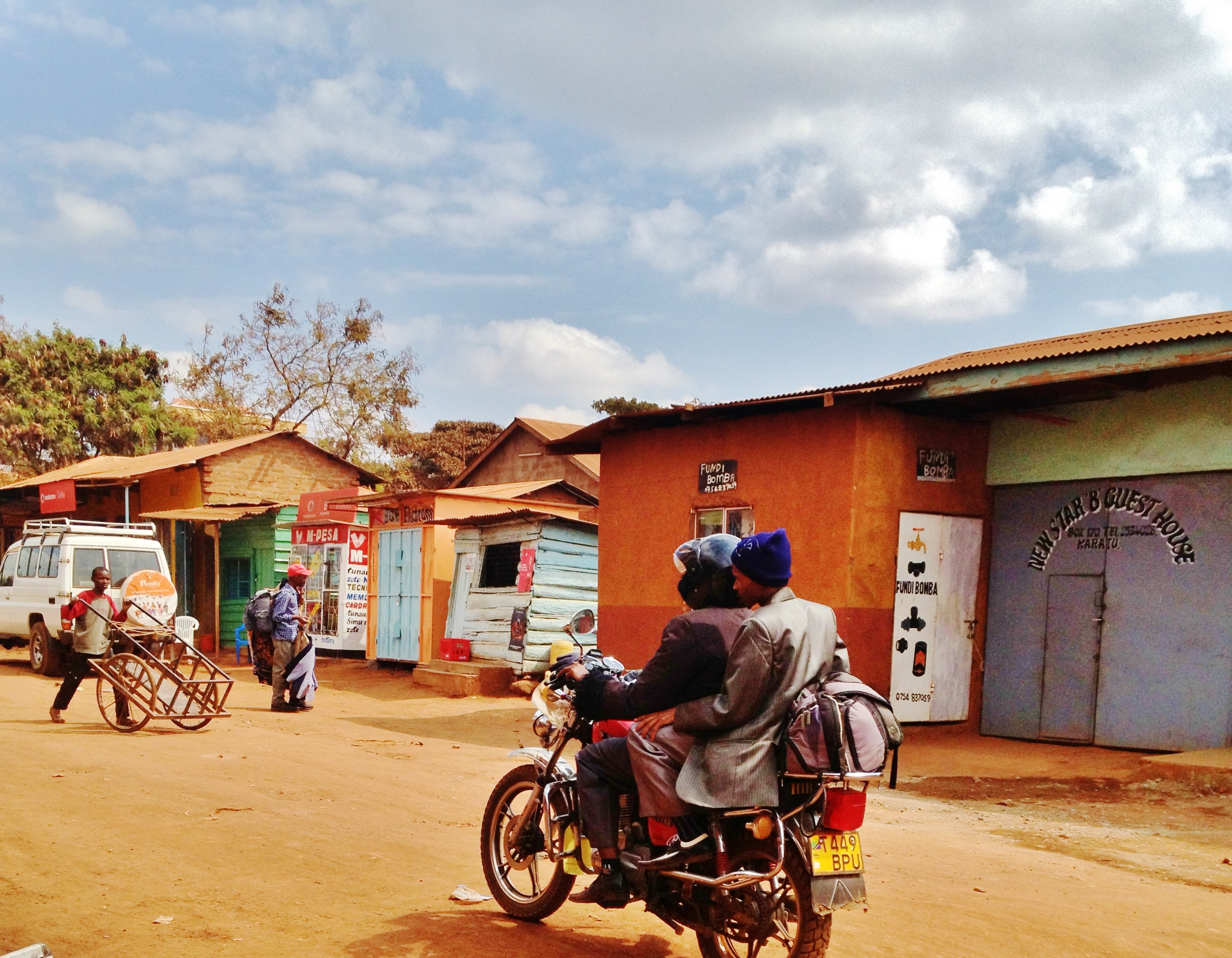 Karatu, Tanzania